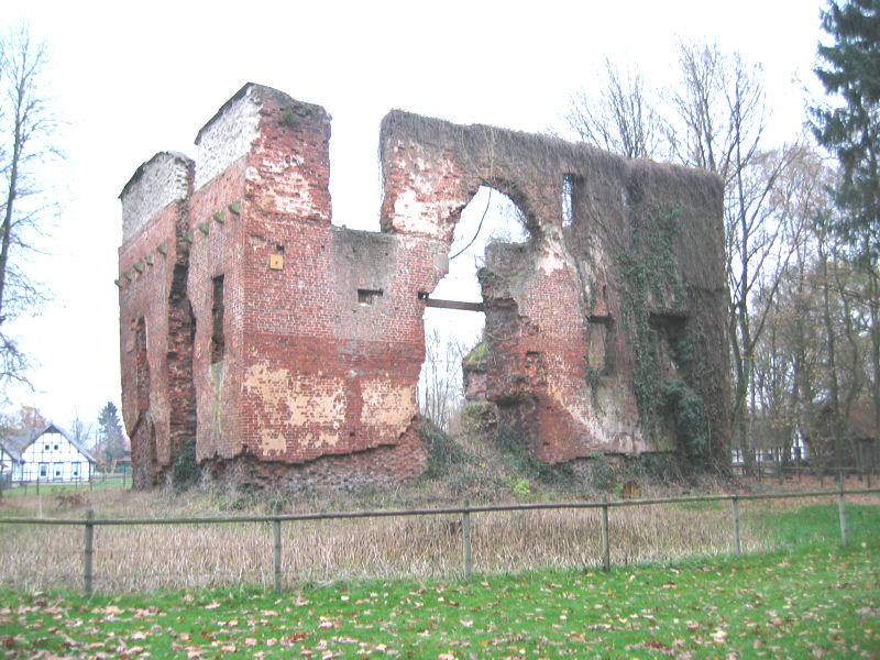 Die Burgruine der Burg Rahden in Rahden im Herbst 2008